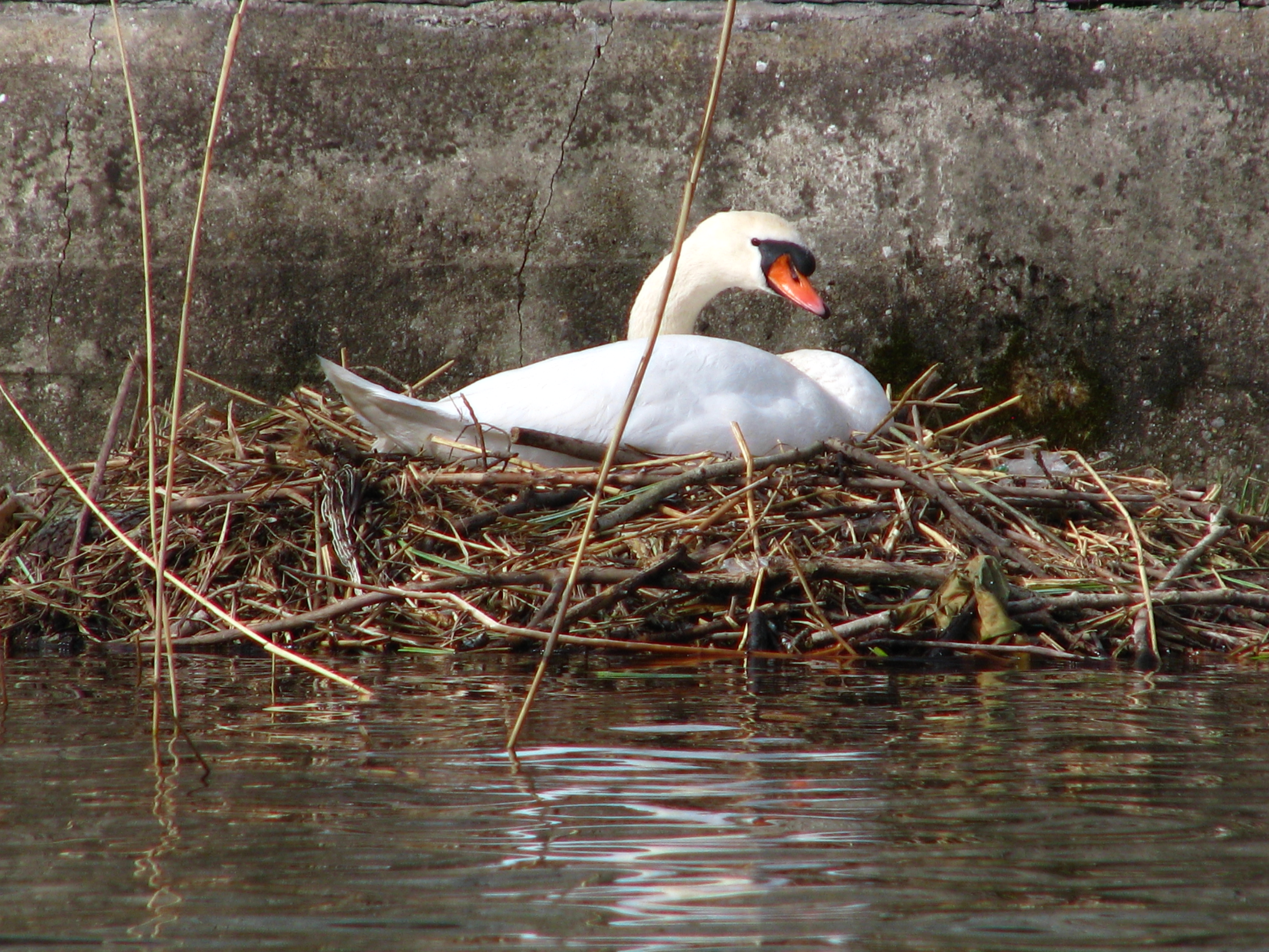 Ustermer Aa in Wetzikon (Switzerland)